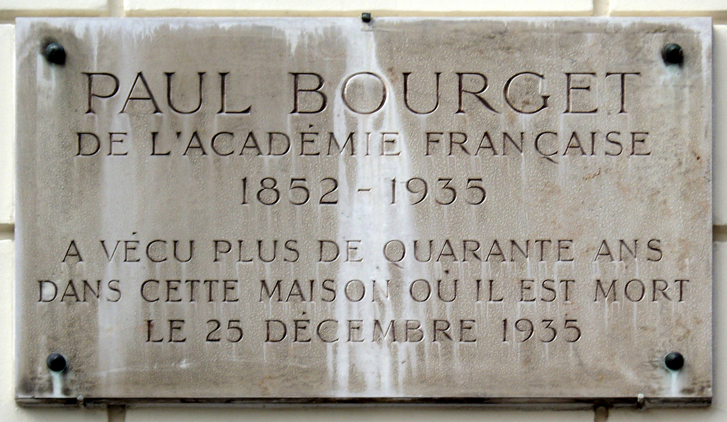 Plaque apposée au n° 20 de la rue Barbet-de-Jouy, Paris 7e, où habita pendant plus de 40 ans l'écrivain Paul Bourget (1852-1935) et où il mourut le 25 décembre 1935.